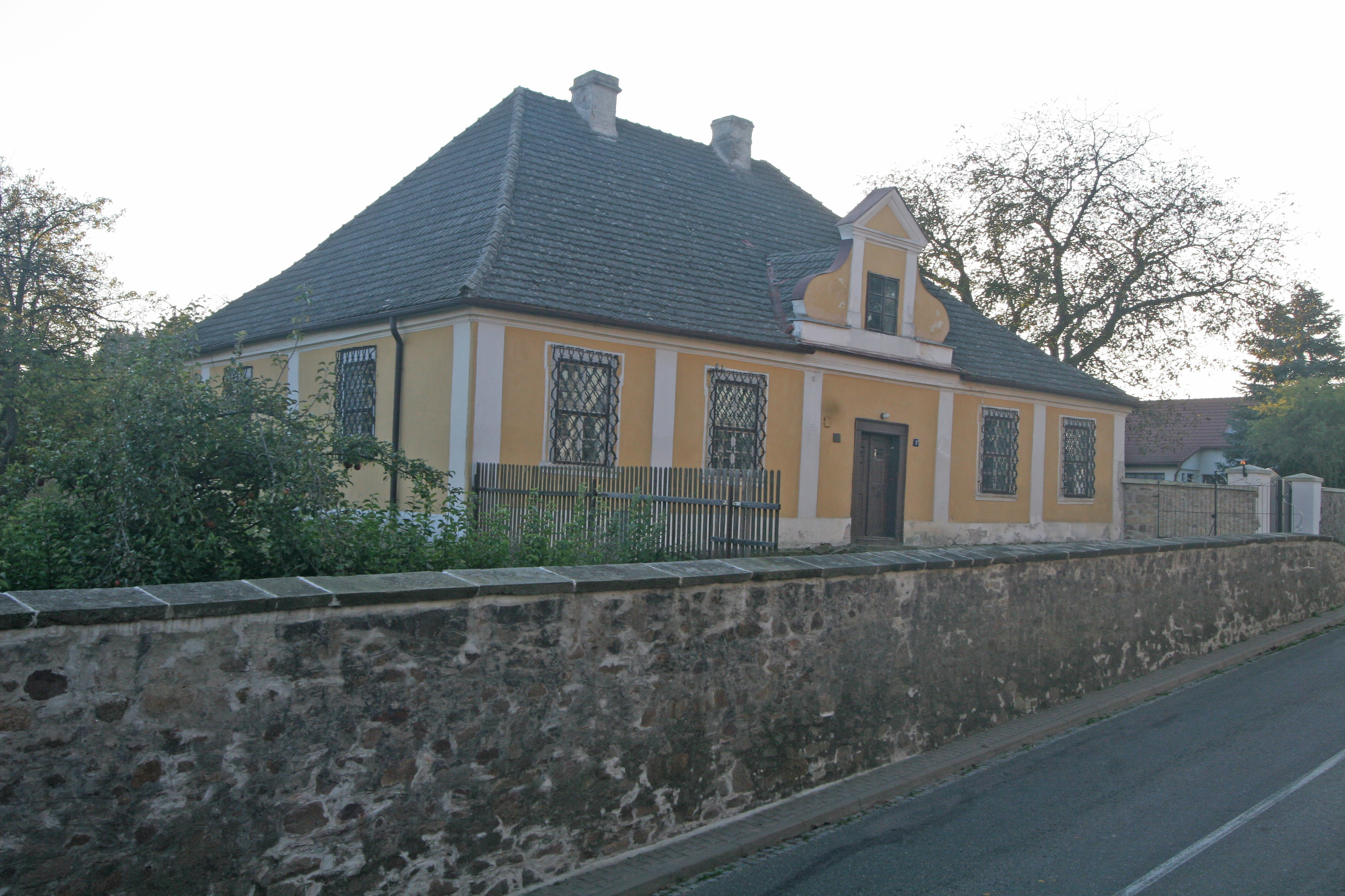 Fara (Zdechovice), Zdechovice 8